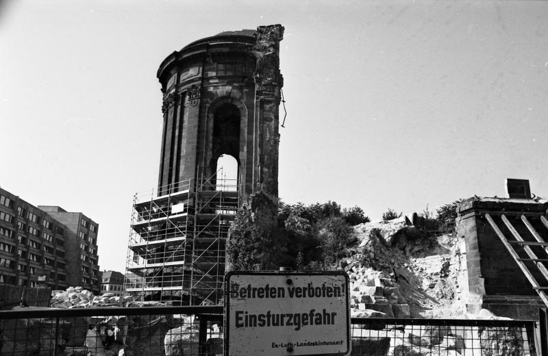 7.7.1991 Stadtansichten Dresden Ruine der Frauenkirche